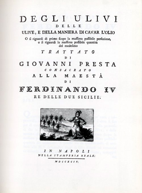 Frontispizio dell’edizione originale : Degli ulivi, delle ulive, e della maniera di cavar l'olio. Opera di Giovanni Presta